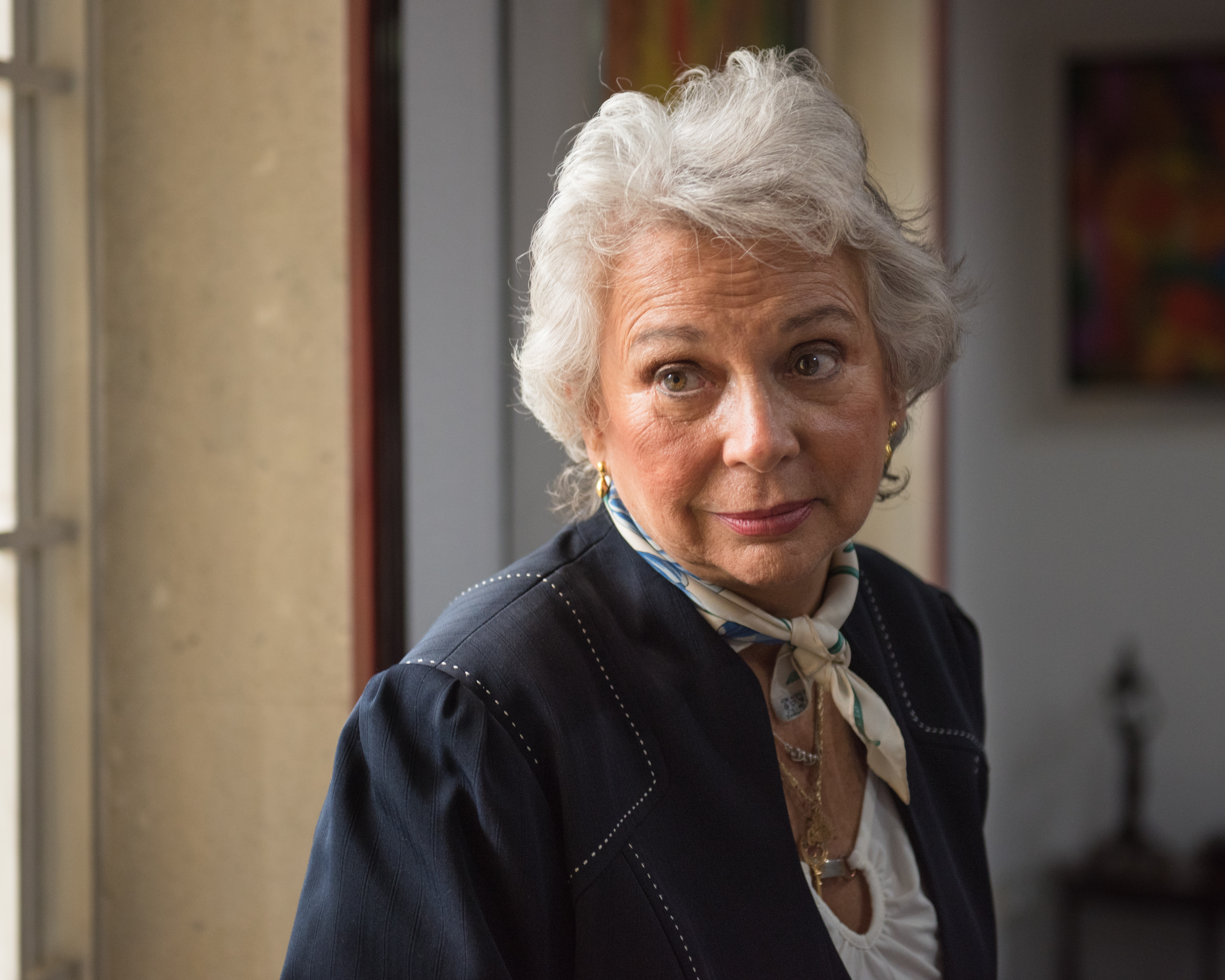 Abogada mexicana que se desempeñó como ministra de la Suprema Corte de Justicia de la Nación